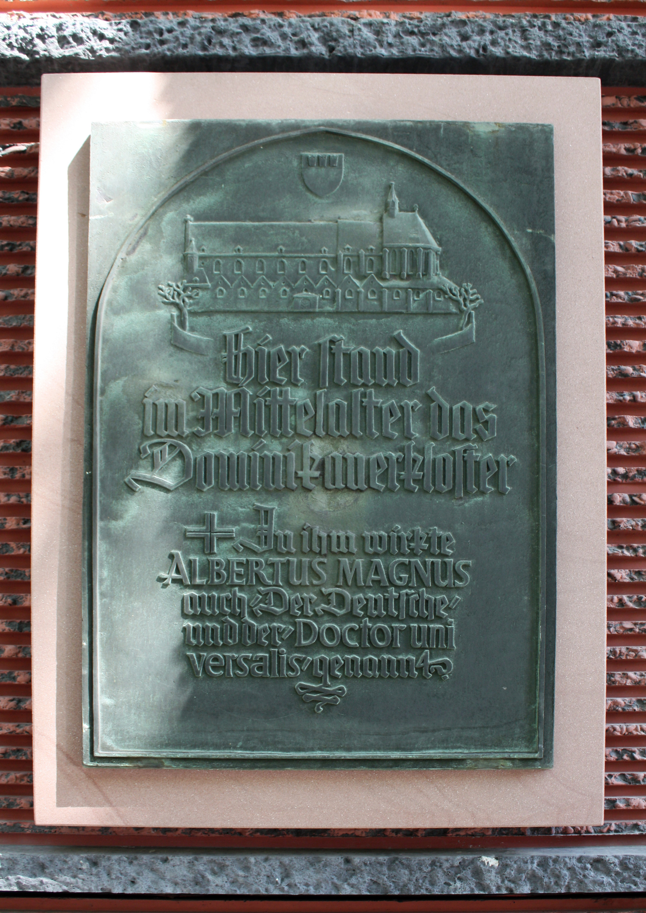 Kloster der Dominikaner Köln, Gedenktafel am ehemaligen Standort